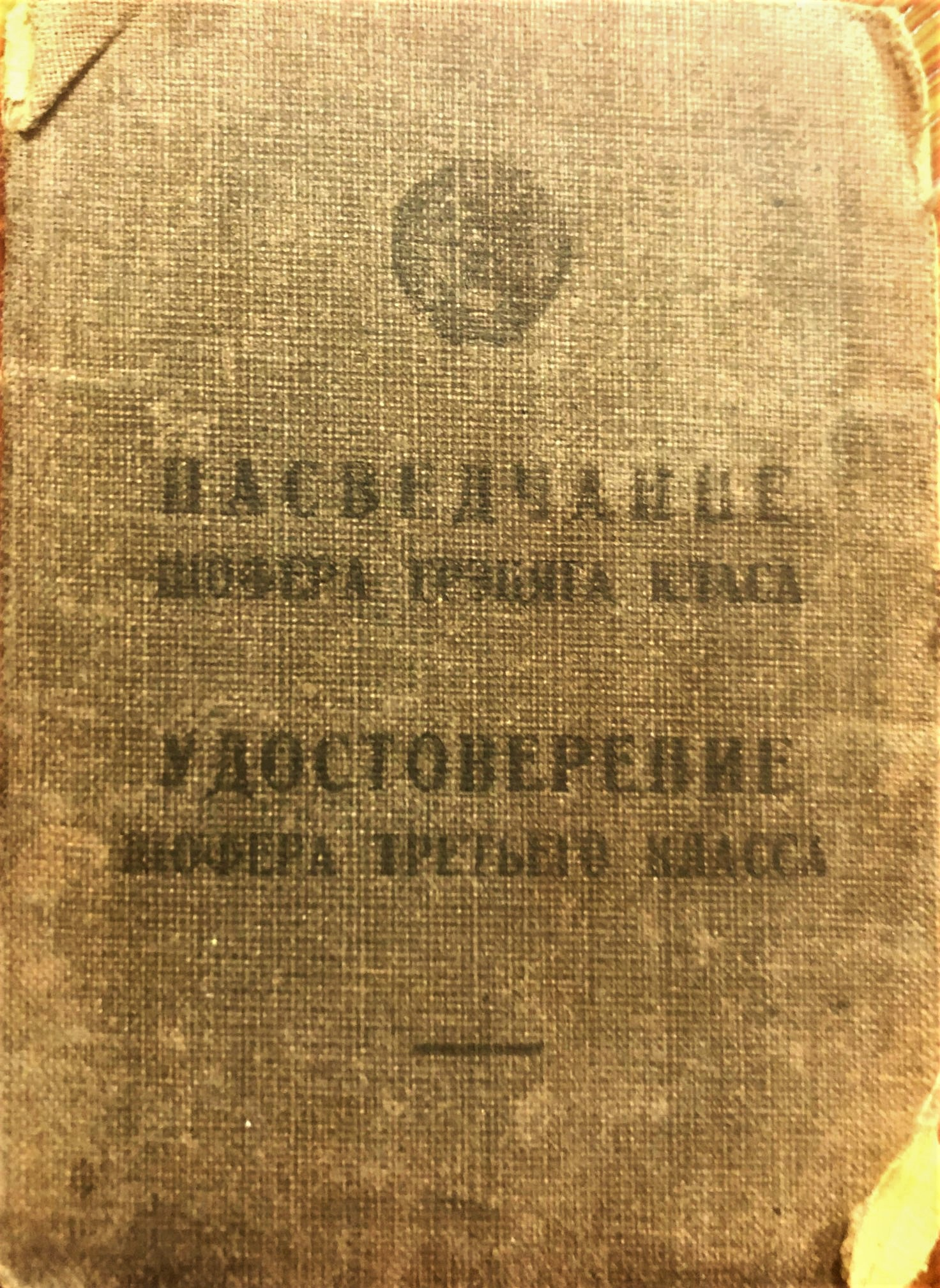 כריכת תעודה רשמית של משה קצף ז"ל, יליד קהילת בריסק דליטא, בתקופת מלחמת העולם השנייה.